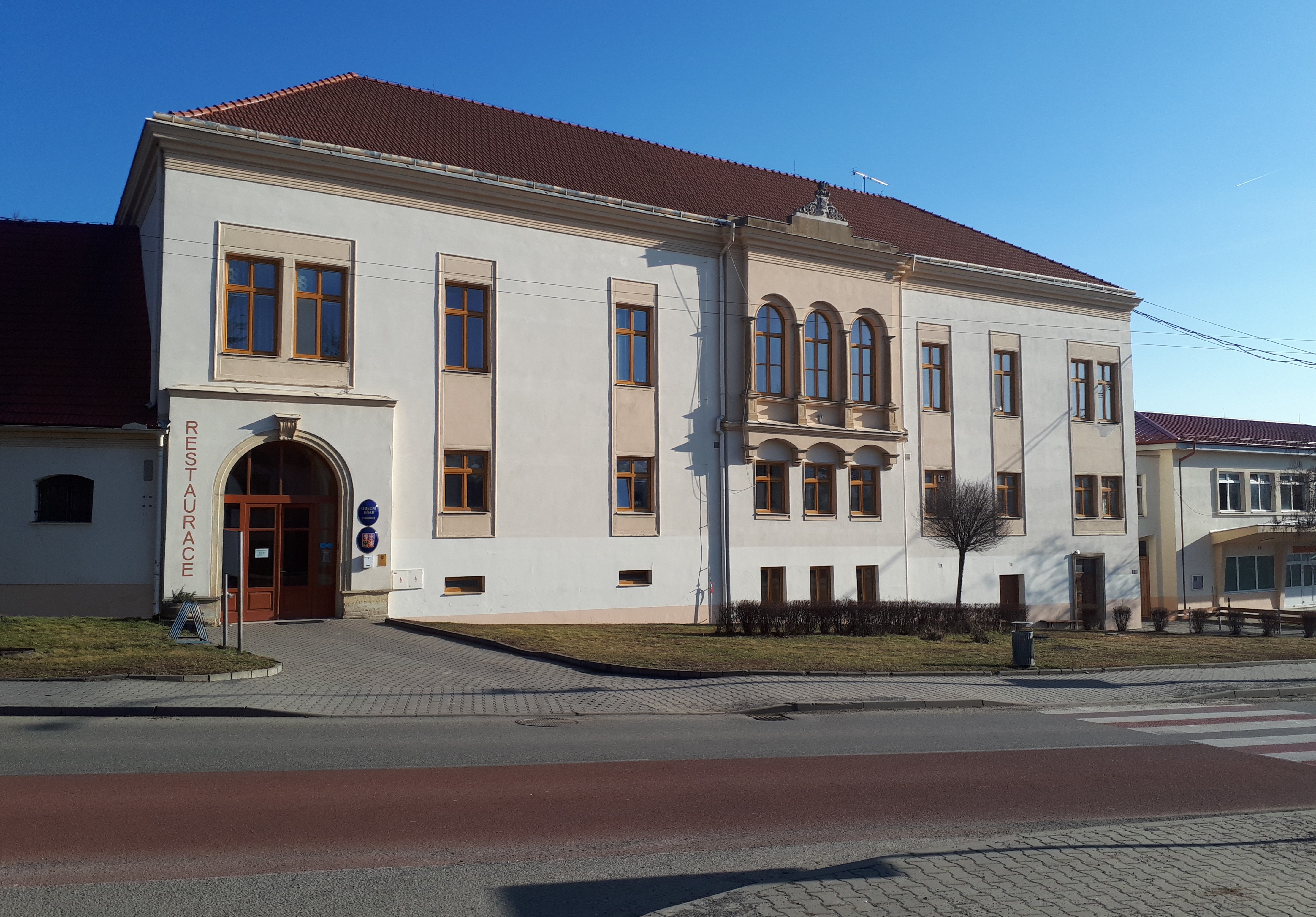 Průčelí